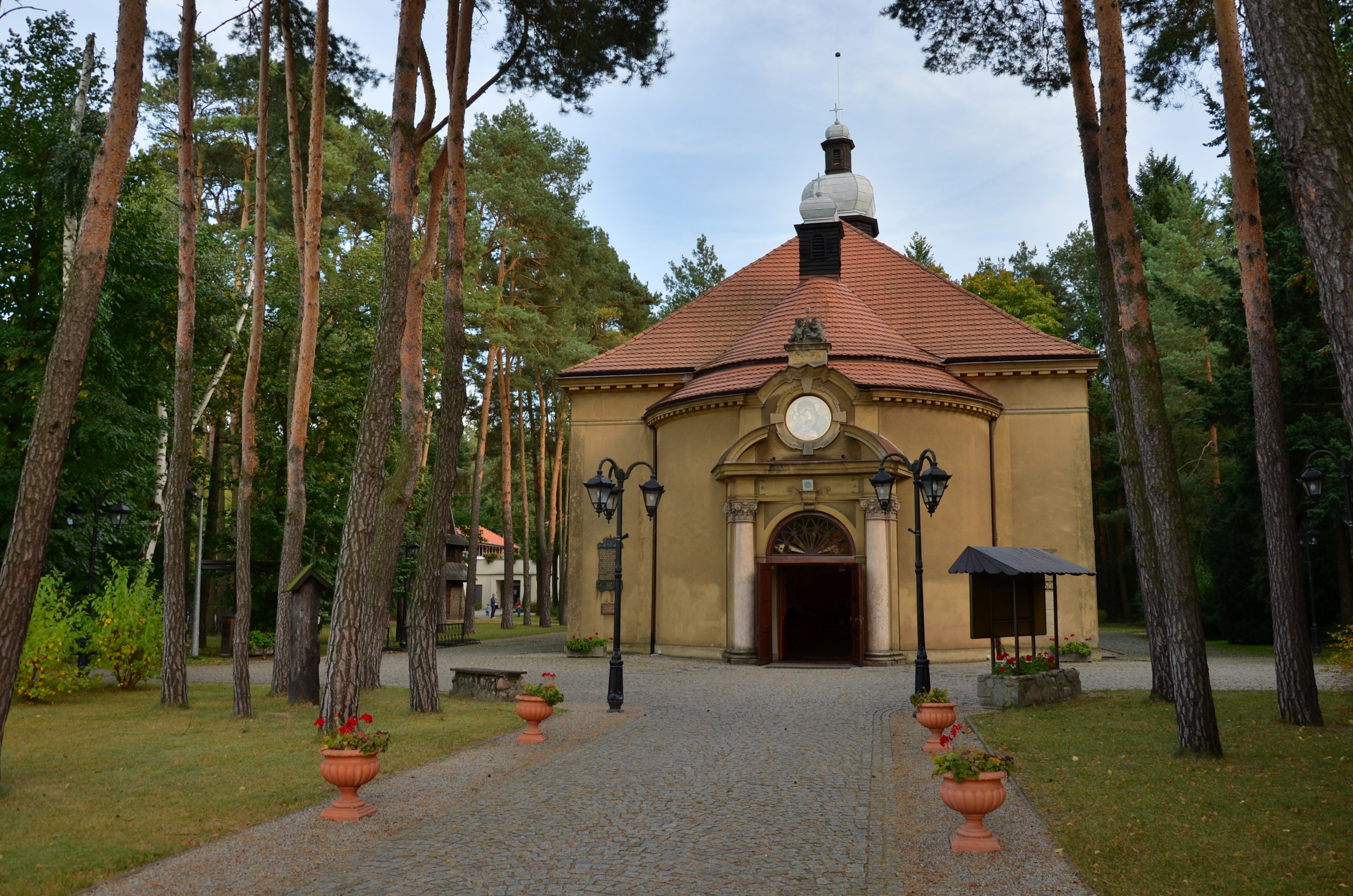 zespół kościoła parafialnego z lat 1923-1928, kościół pw. Matki Boskiej Wniebowziętej, cmentarz kościelny, plebania, ogród plebański Puszczykowo, ul. Kościelna 1, Puszczykowo